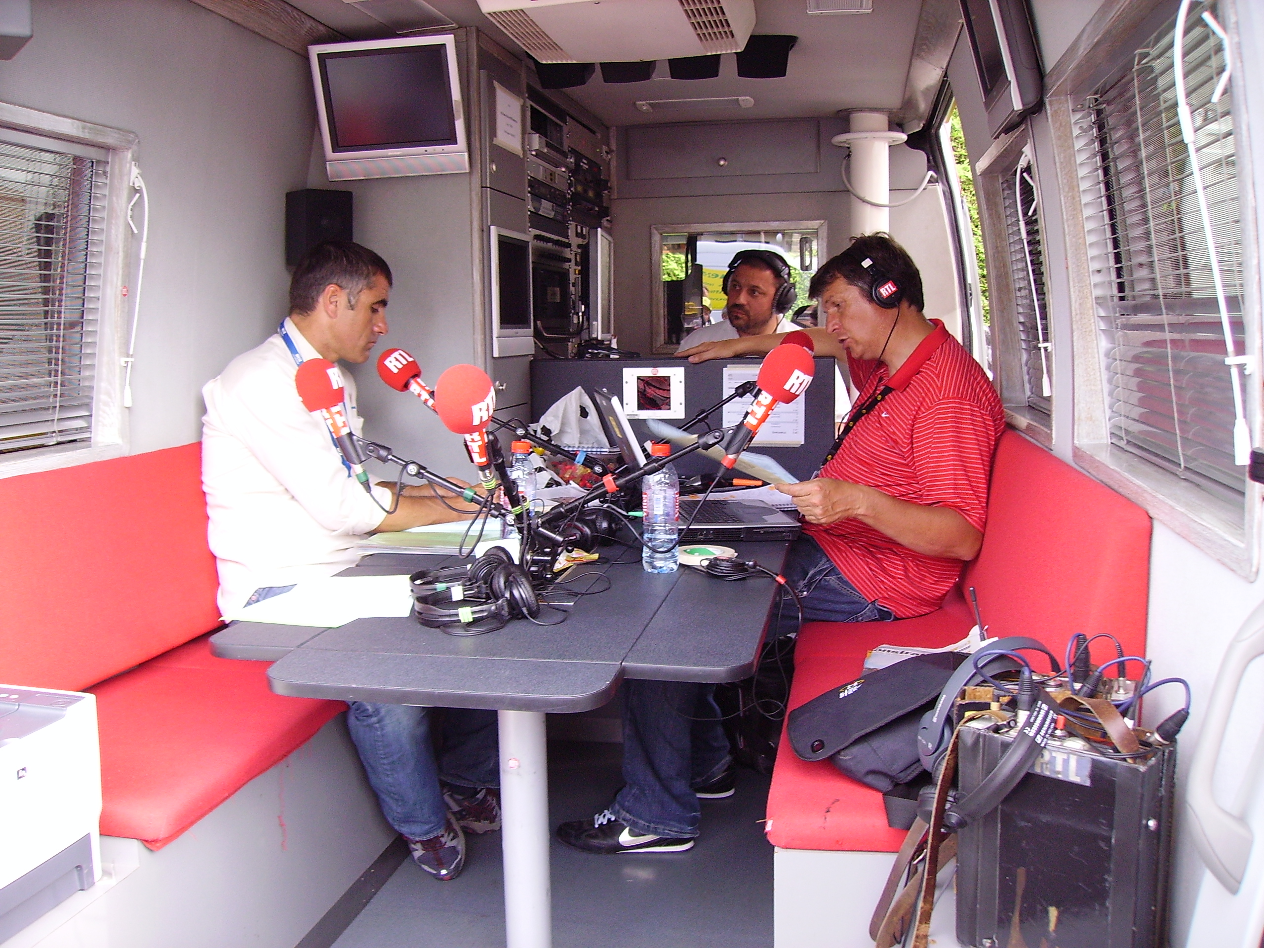 Laurent Jalabert (à gauche) et personnel RTL lors de la 11e étape du Tour de France 2009. Le studio mobile de RTL se trouve à l'arrivée de l'étape à Saint-Fargeau (Yonne).